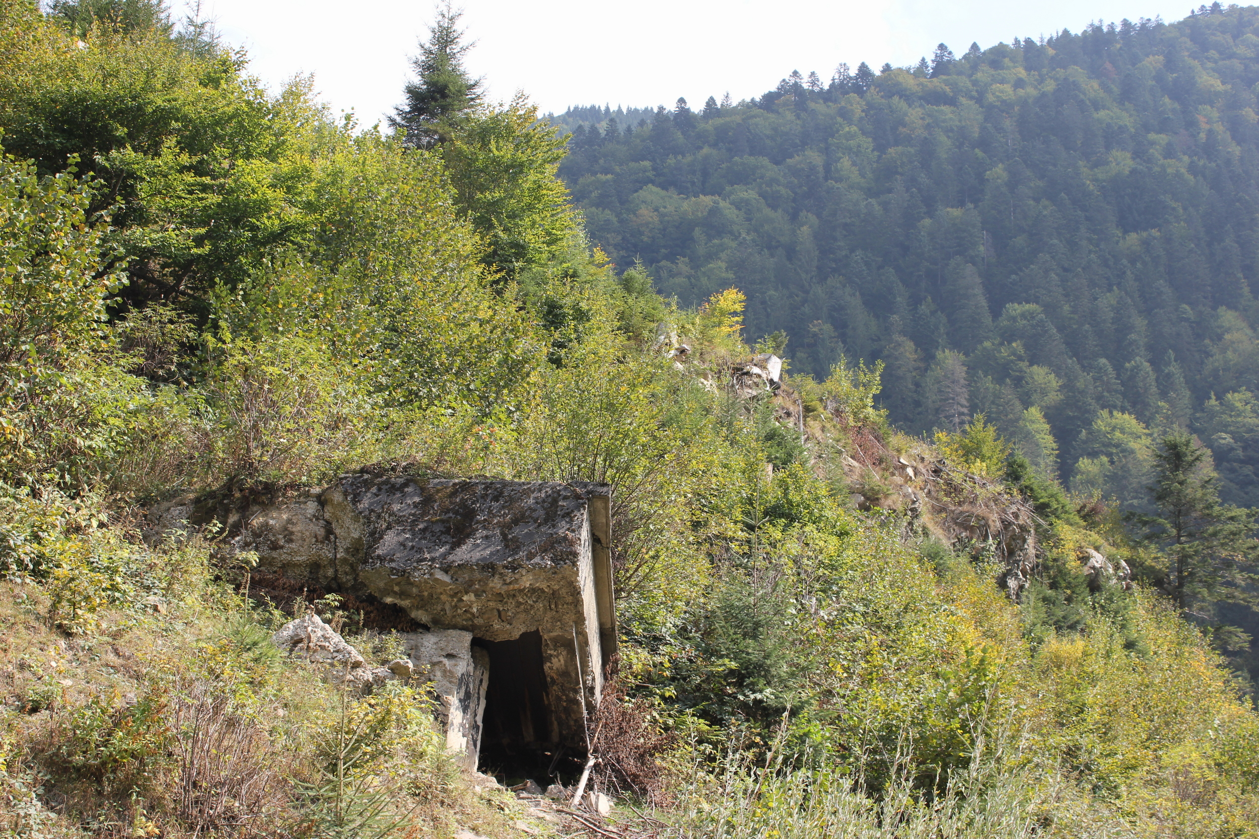 Bunker der ungarischen Arpád-Linie bei Ust-Tschorna, Transkarpatien, Ukraine.